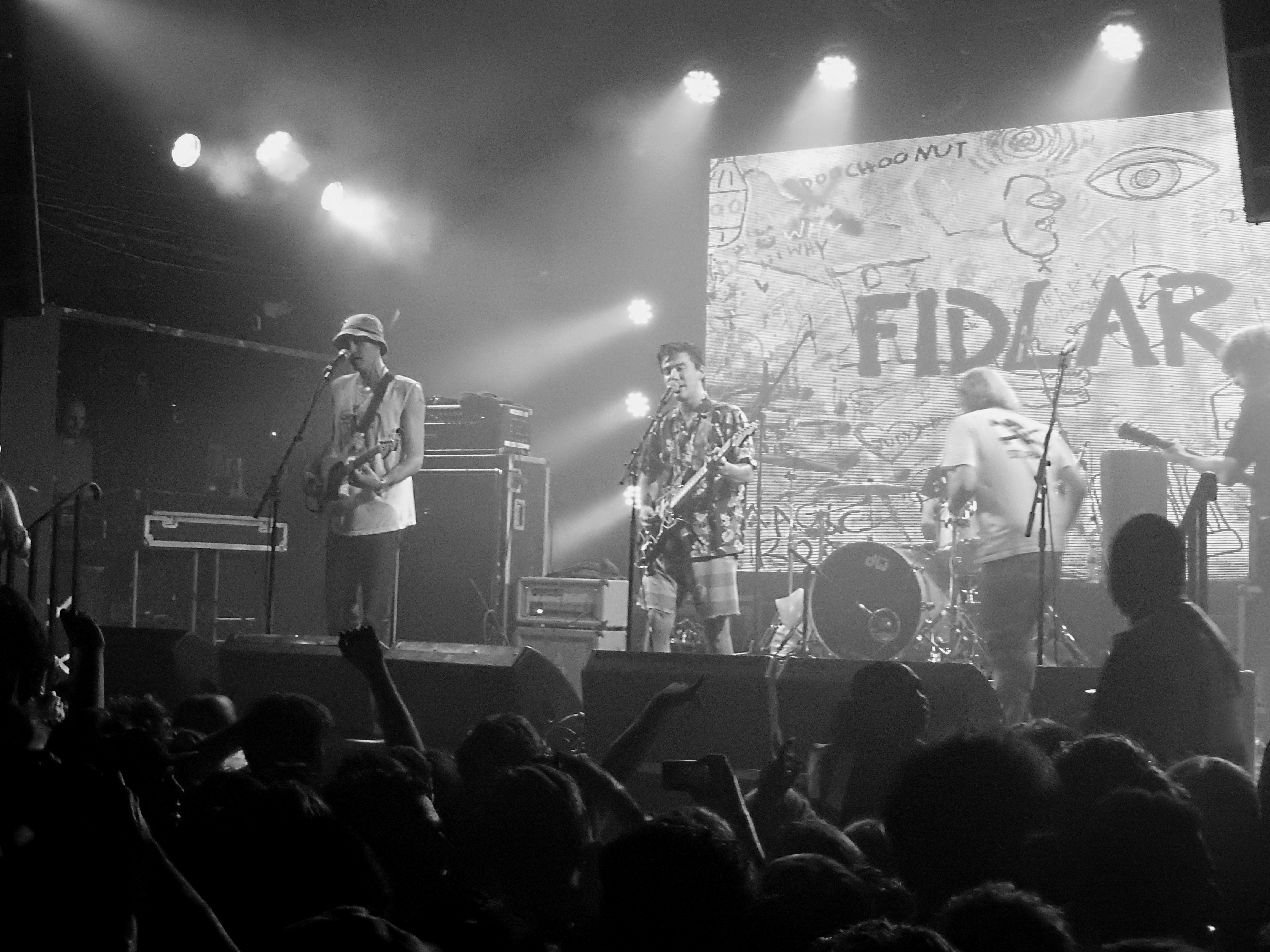 FIDLAR, Heaven, London